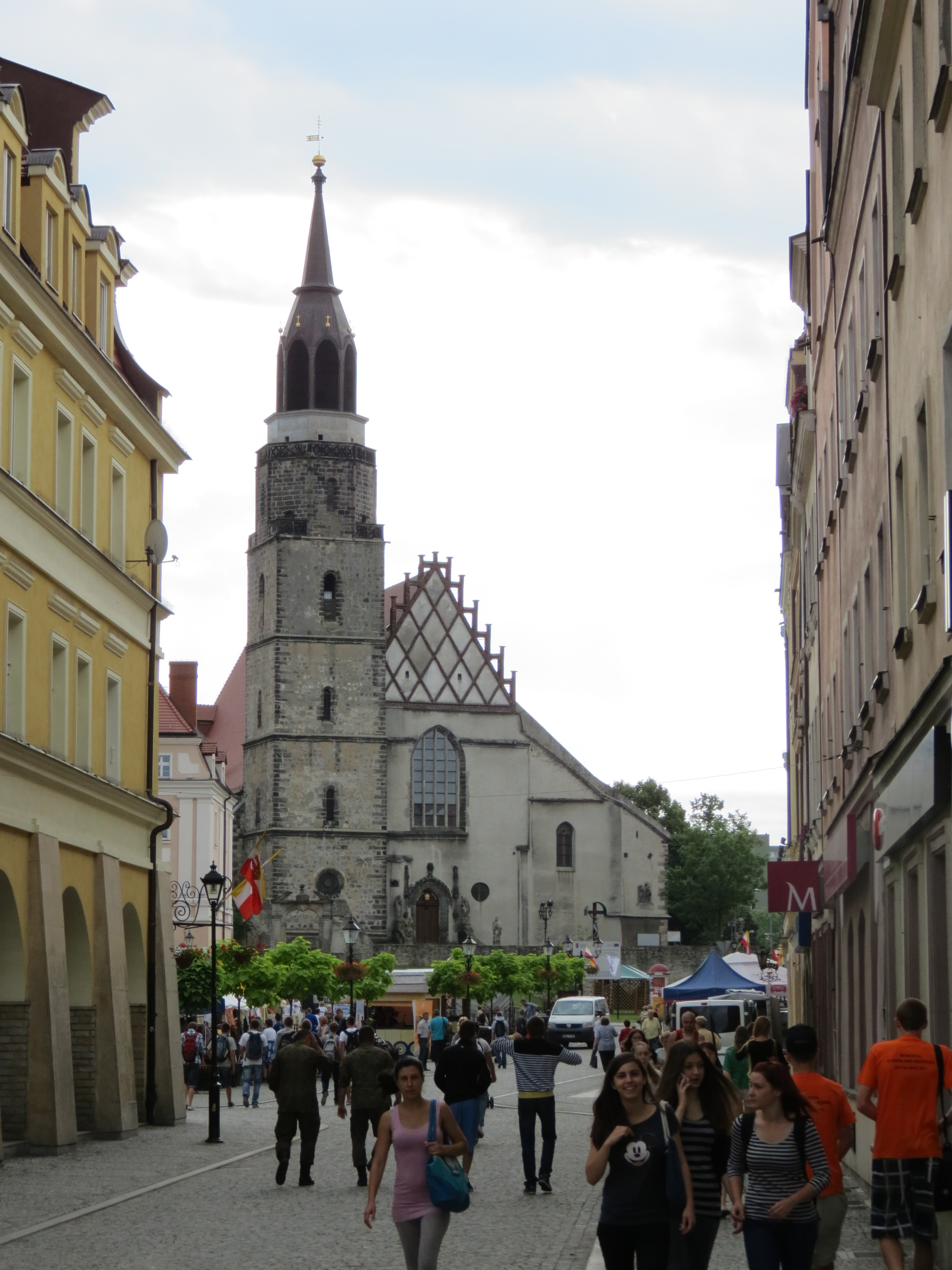 Bolesławiec, kościół par. p.w. Wniebowzięcia NMP i św. Mikołaja, 2 poł. XV, XVI, 2 poł. XVII